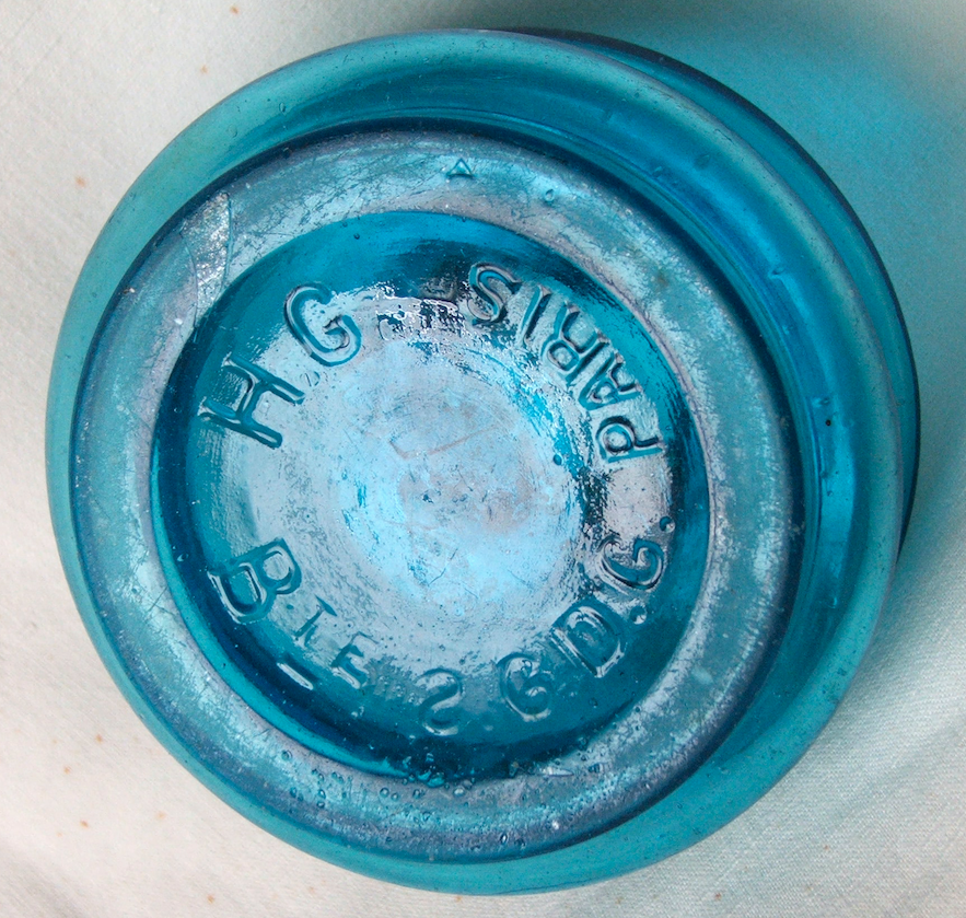 verre à réchauds et lampes Henri Gautreau HG breveté 1889